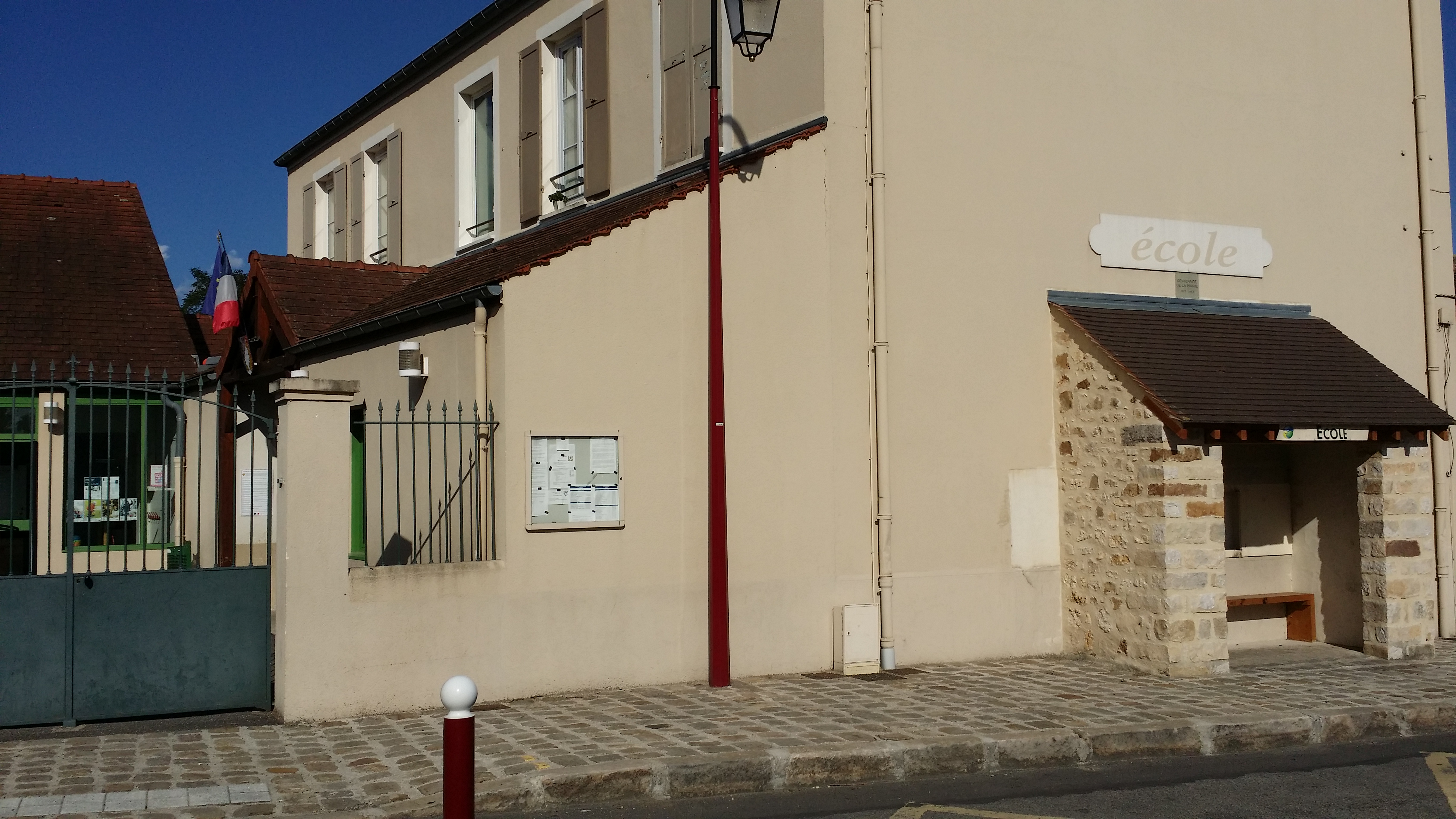 Ecole de Saint-Germain-sur-École